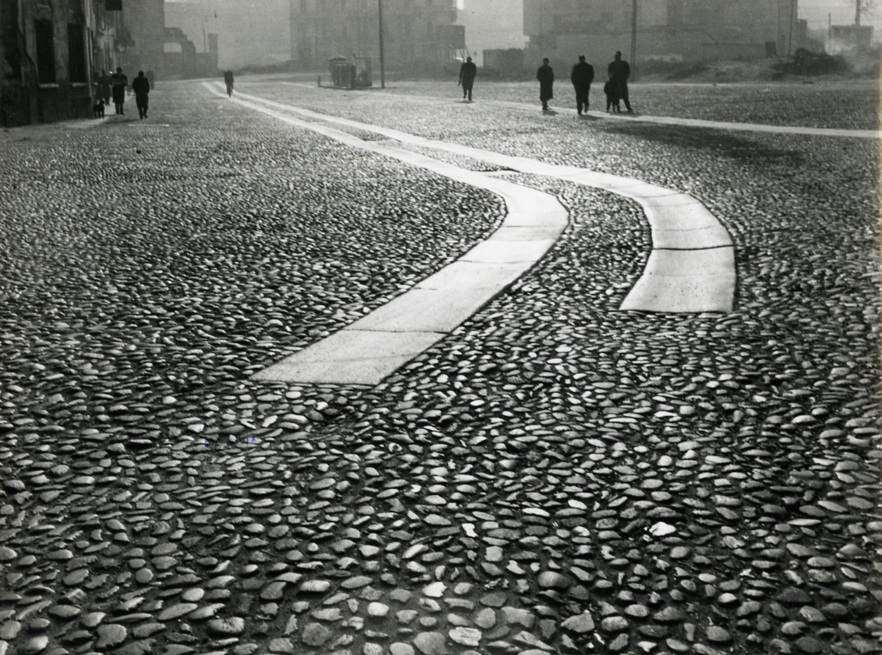 Serie fotografica : Milano, 1953 / Paolo Monti. - Stampe: 3 : Positivo b/n, gelatina bromuro d'argento/ carta, 24x30. - ((Al verso di una stampa manoscritto: "Piazaz della Vetra Milano 1953" e timbro a inchiostro: "Pubblicata il 24 aprile 1981 Corsera". Al verso di una stampa manoscritto: "Lo spazio della memoria. Piazza della Vetra nel 1953". Sul coperchio della scatola, manoscritto a pennarello: "Milano anni '50". - Piazza della Vetra